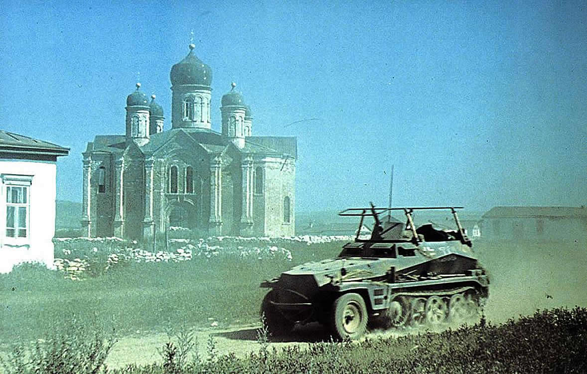 Май 1942 года, Sdkfz-250 на фоне Церкви Спаса Преображения в селе Ольховчик, Ростовская область